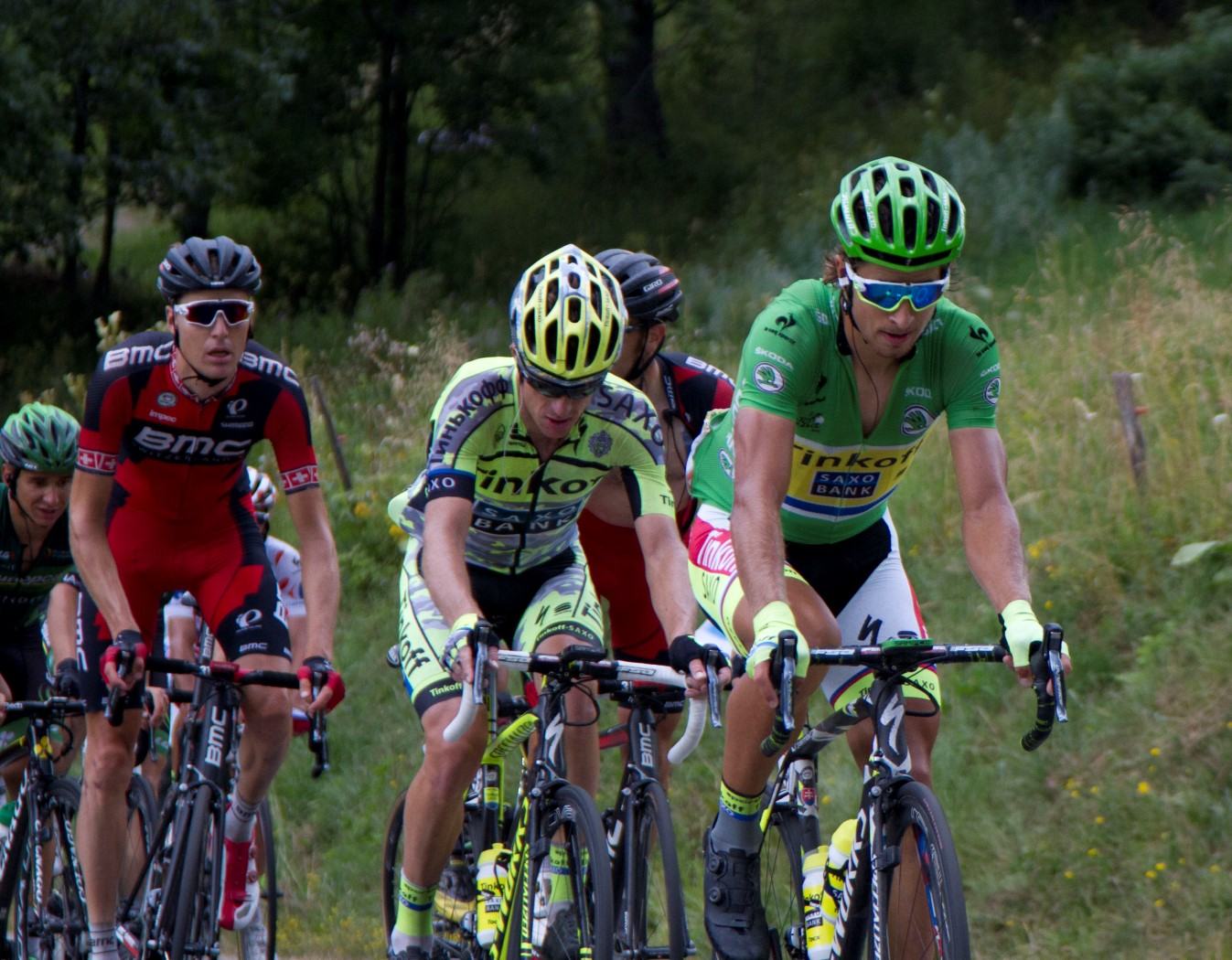 210 sagan-bus